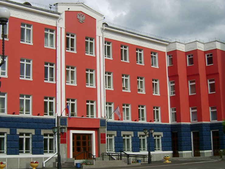 Фотография Администрации города Абакана. Фотография получена в День 300-летия присоединения Хакасии к России (3 июля).